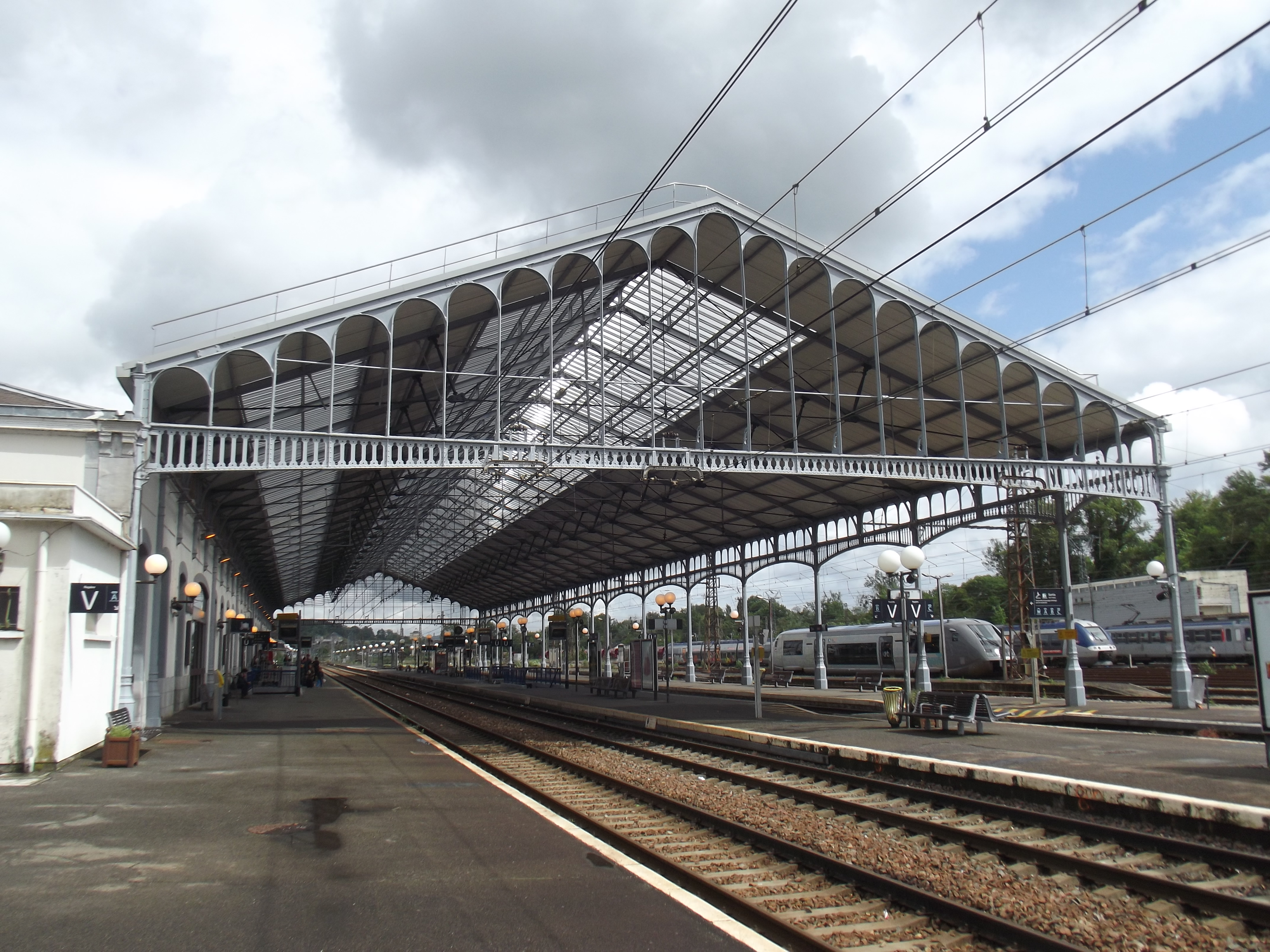 Station Pau